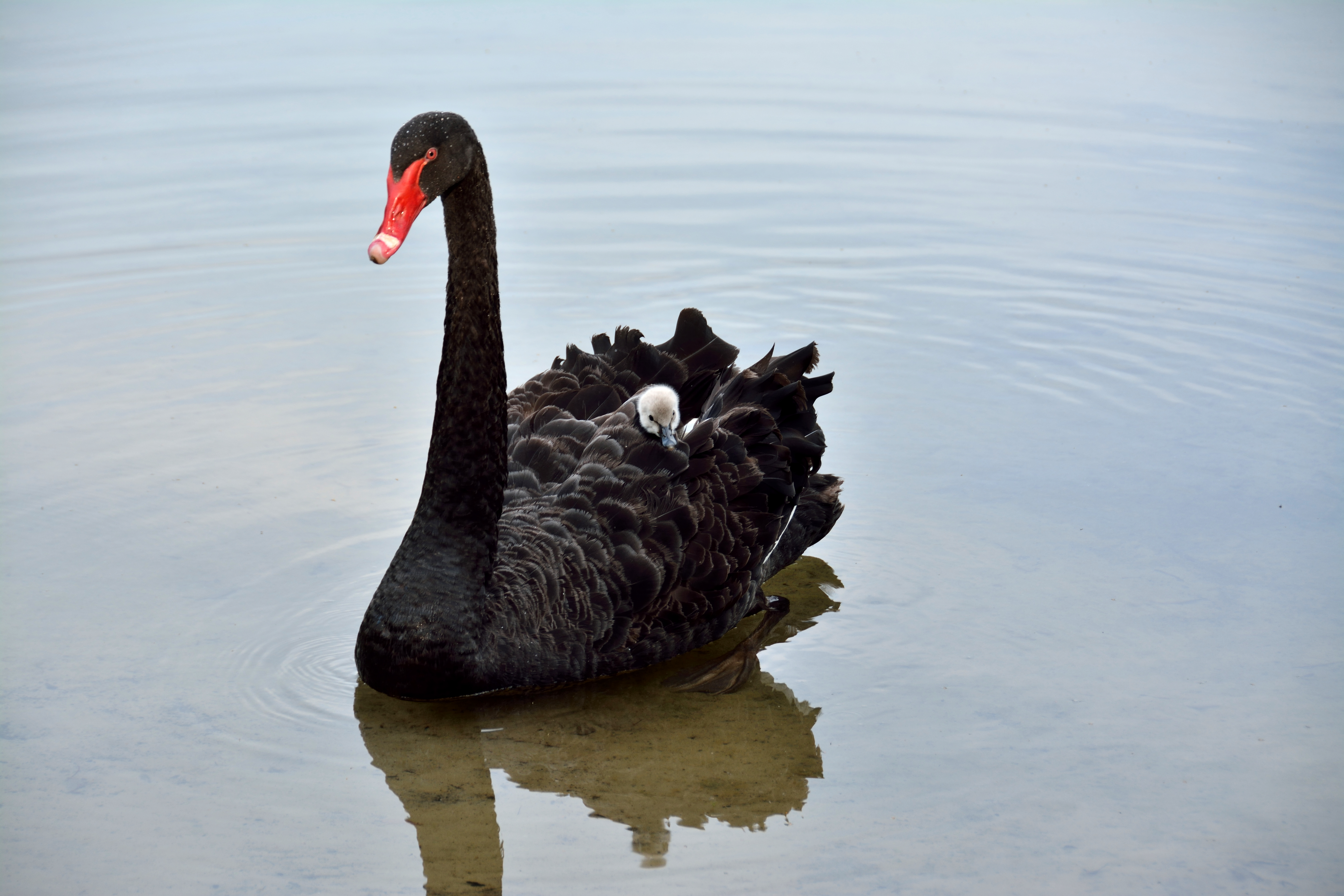 Ein Trauerschwan mit Küken auf der Alsens Tongrube. Er kommt vermutlich von dem am anderen Ufer gelegenen Restaurant. Leider hat mein GPS zwischendurch versagt., aber der müde Kleine ist einfach zu süss.